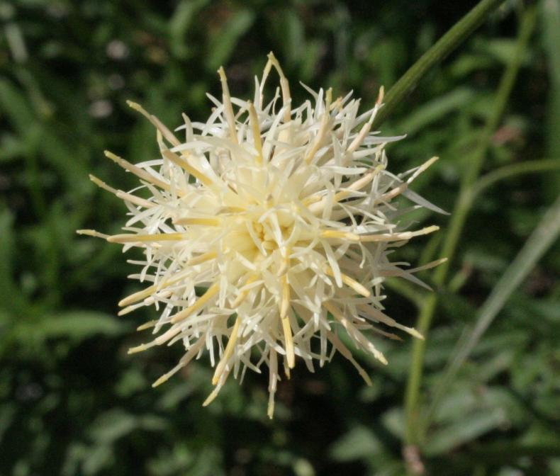 Fiordaliso giallo-roseo - Località: Giardino Botanico Alpino "Giangio Lorenzoni", Pian Cansiglio, Tambre d'Alpago (BL), 1000 m s.l.m.